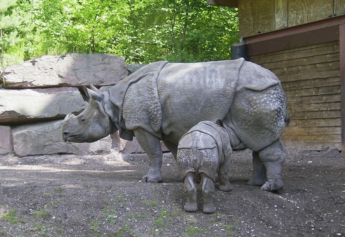 Panzernashorn (Rhinoceros unicornis) mit Jungem im Tiergarten Nürnberg.